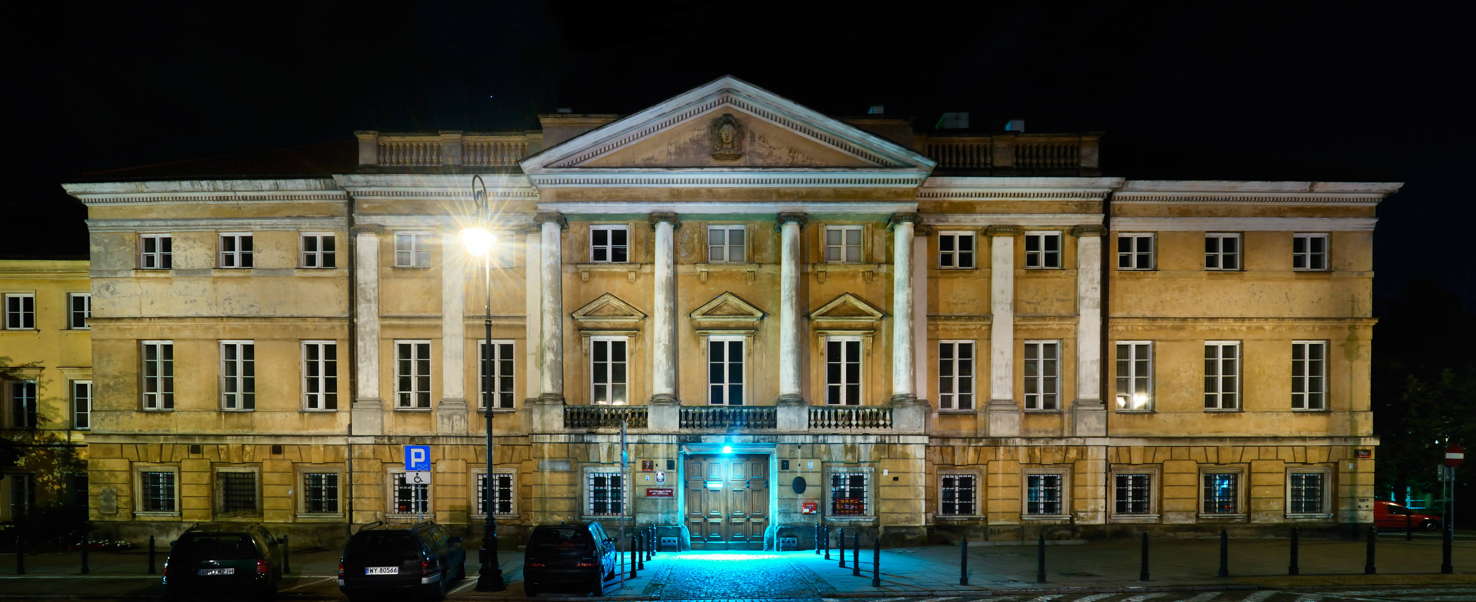 Warszawa, ulica Długa 7